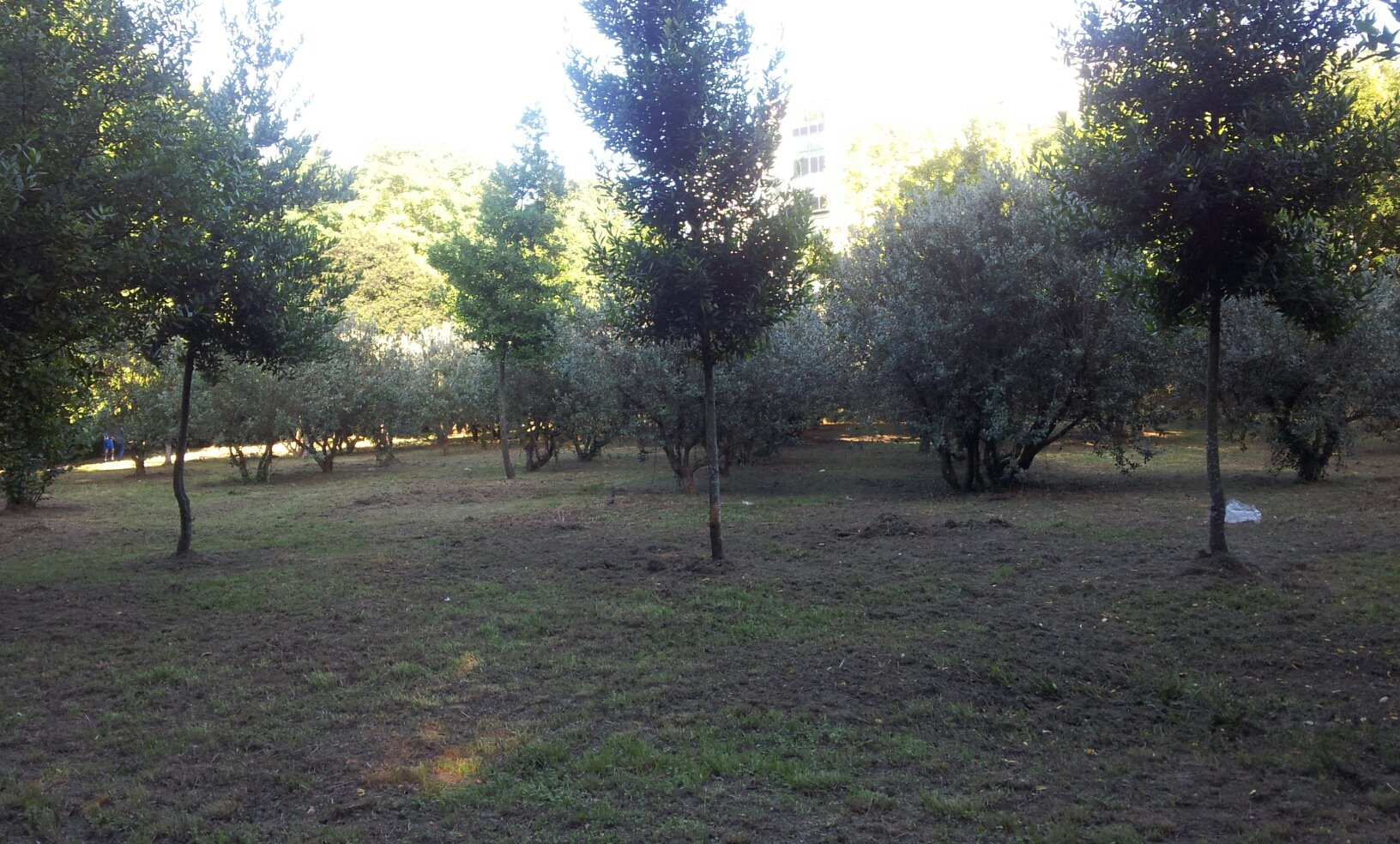 Vista del parque de Pontenova